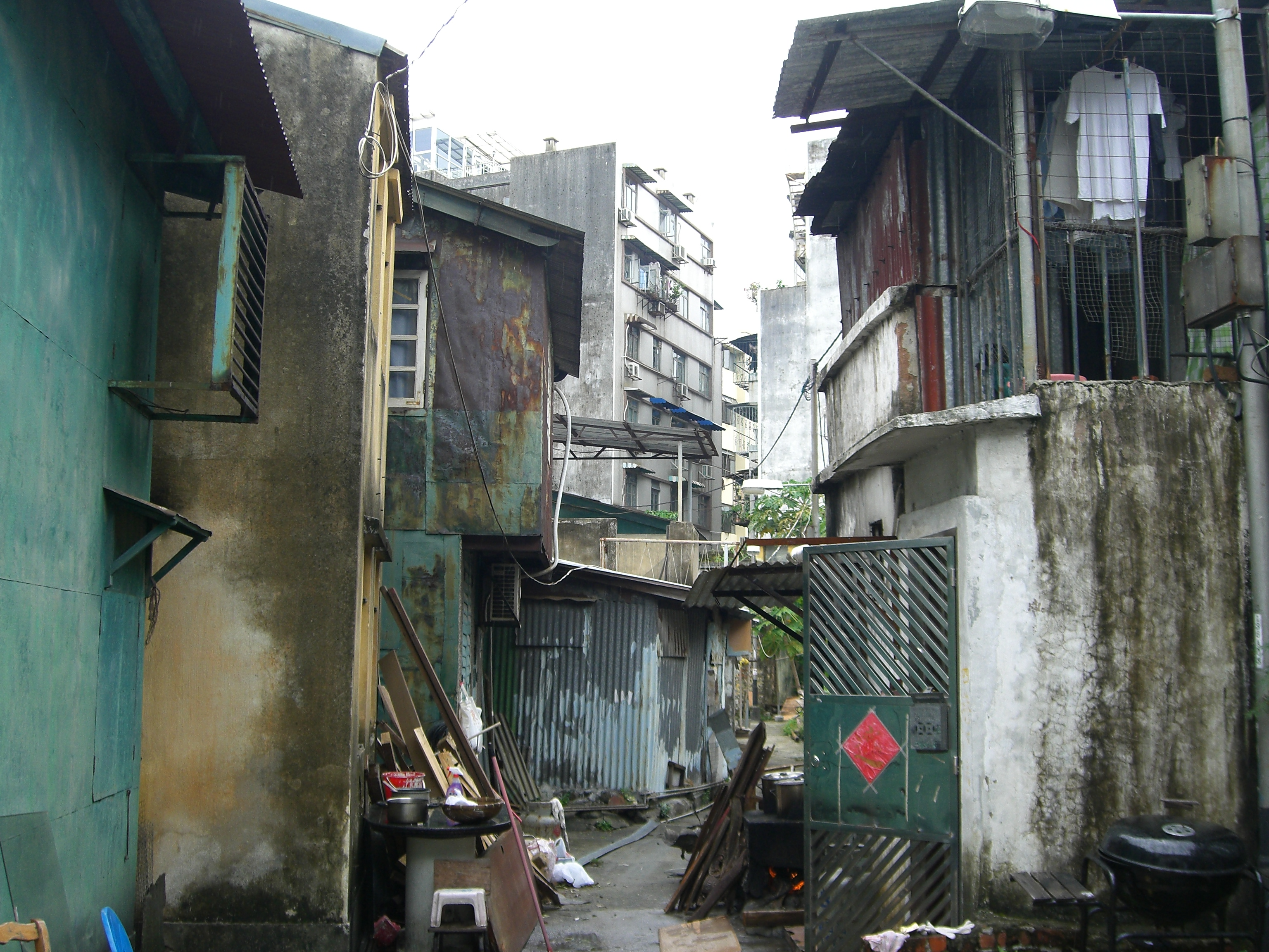 Pátio do Espinho